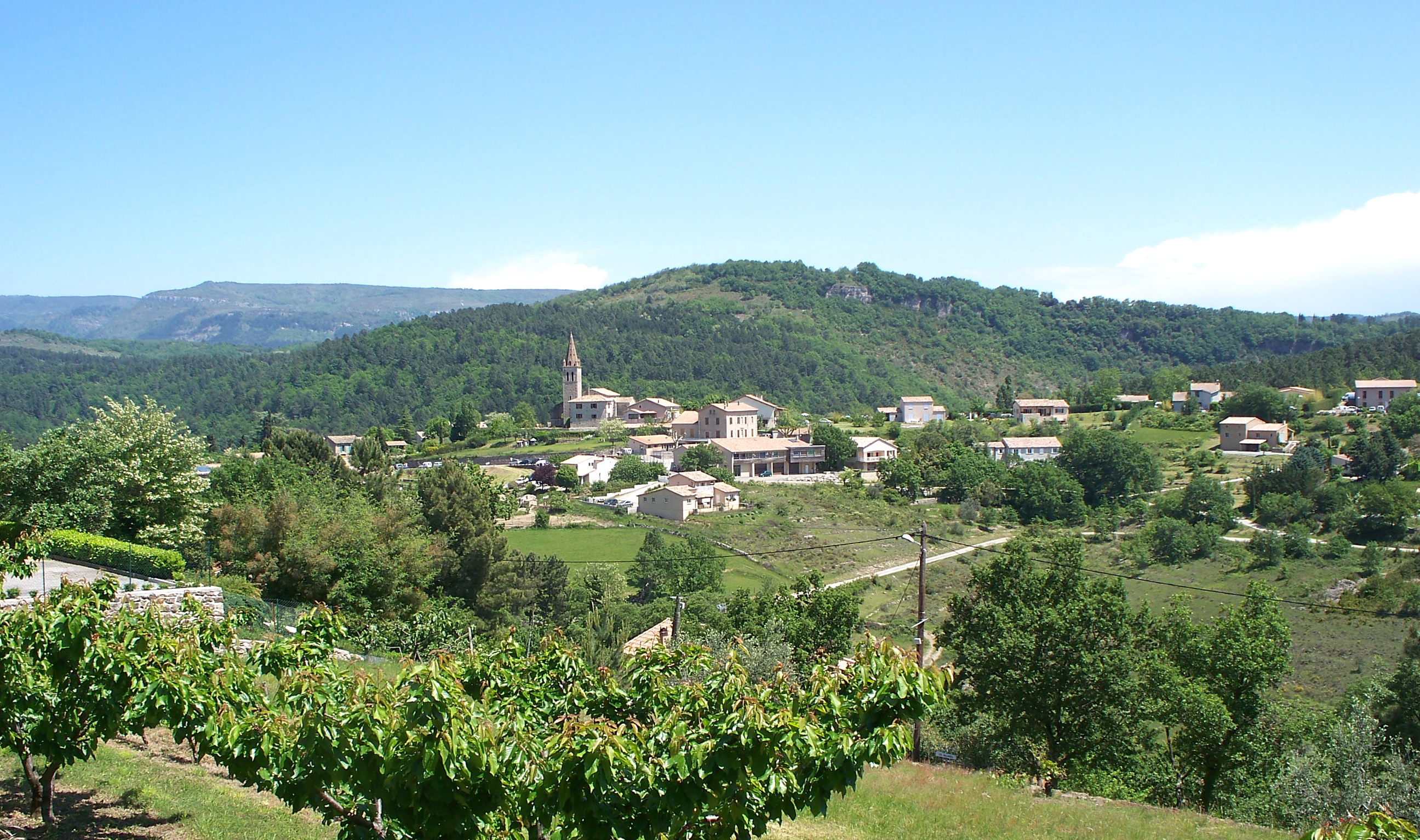 Saint Julien de Serre (Ardèche)